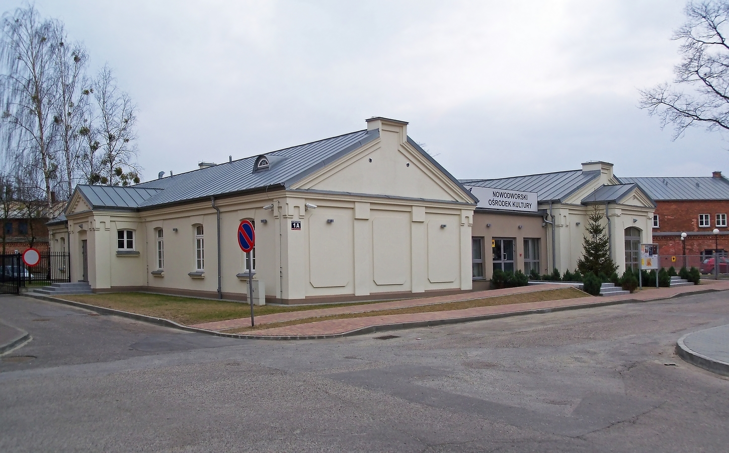 Nowodworski Ośrodek Kultury mieszczący się w zabytkowym budynku dawnej elektrowni Batalionu Elektrotechnicznego